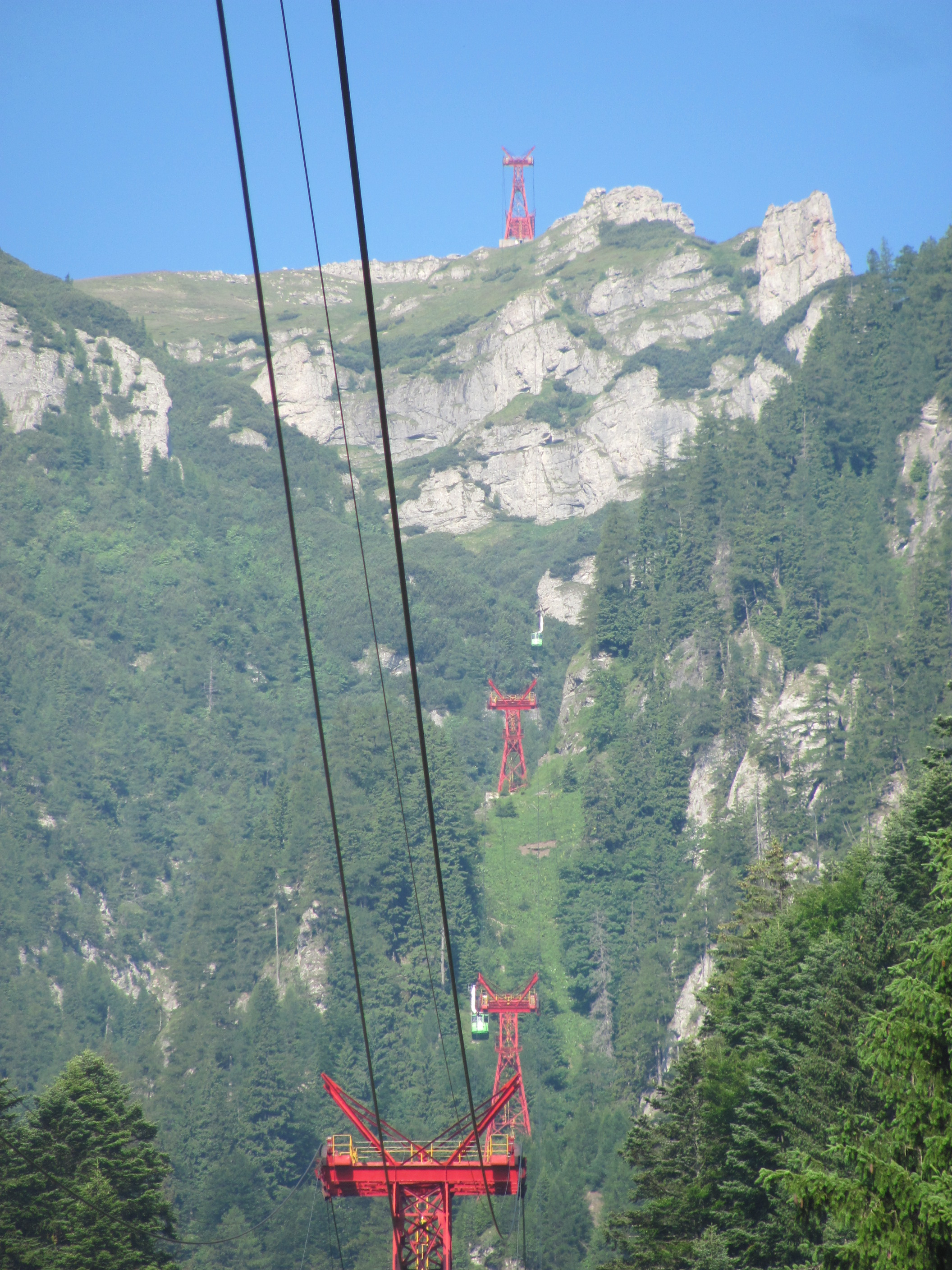 Telecabinele de la Busteni pe traseu-Iulie 2011